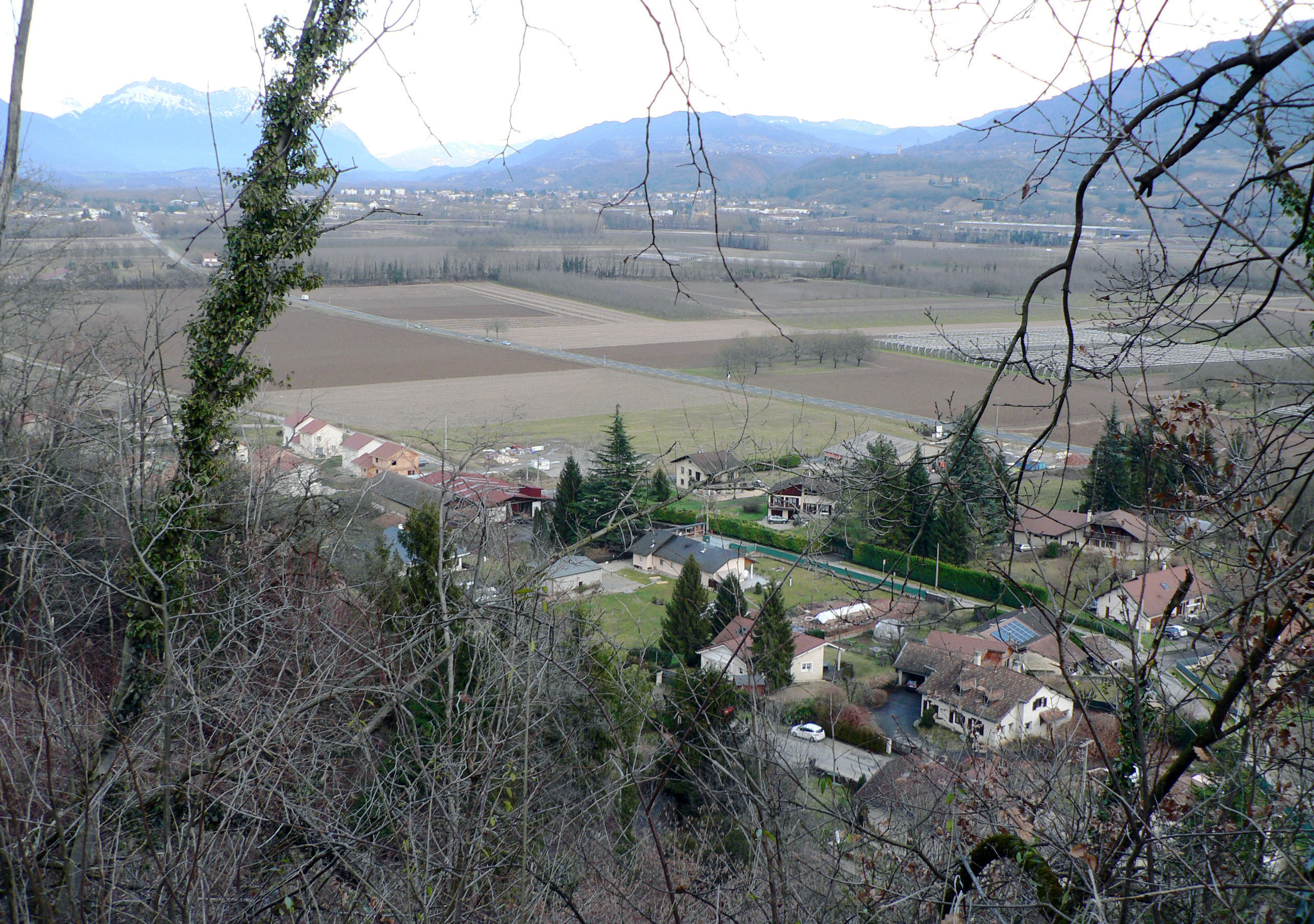 La campagne et le hameau de La Ville, vu depuis le château fort de La Buissière. La Buissière, Isère, AuRA, France.